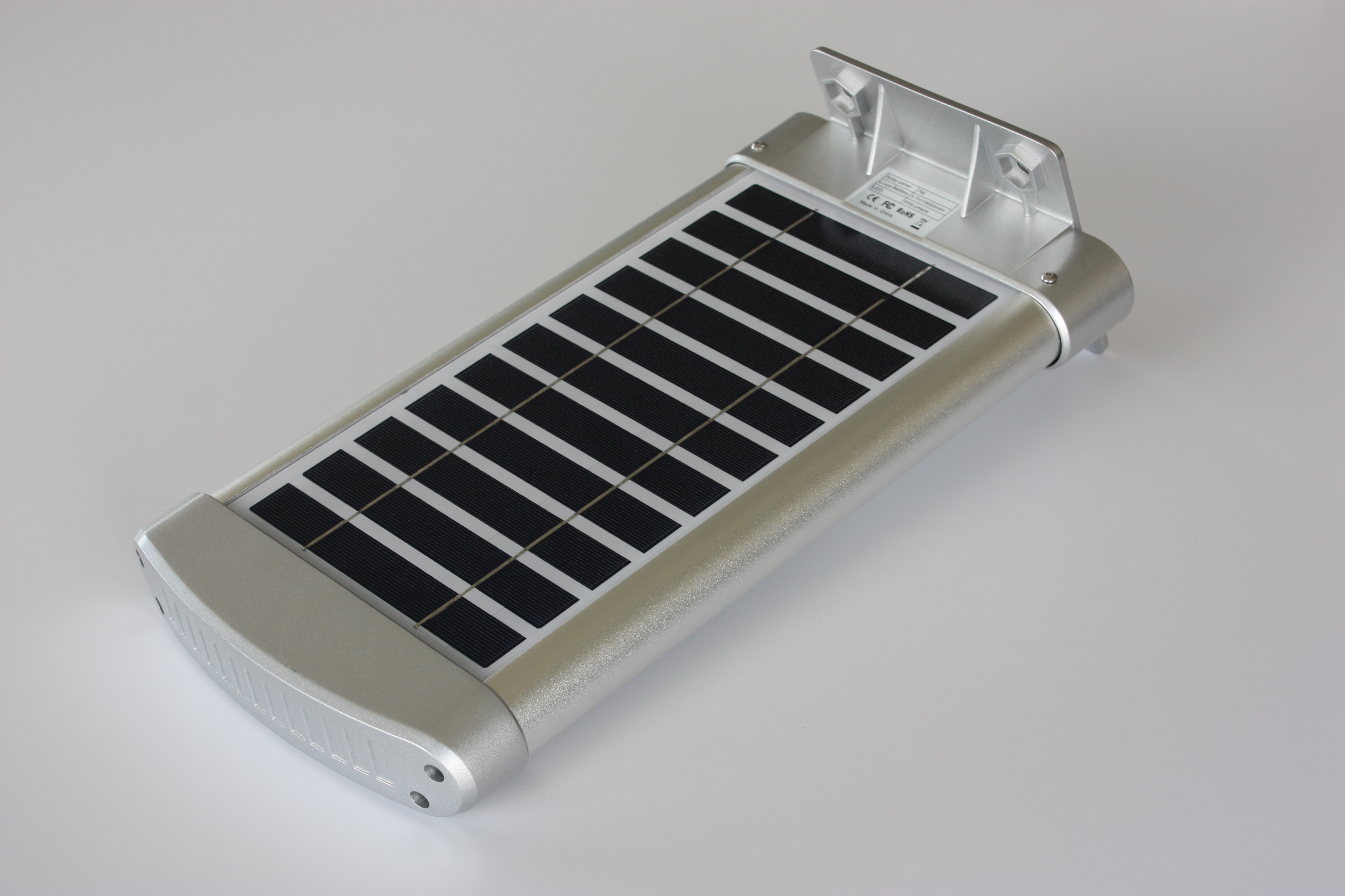 Solarstraßenbeleuchtung ESL-07, Oberseite mit Solarmodul